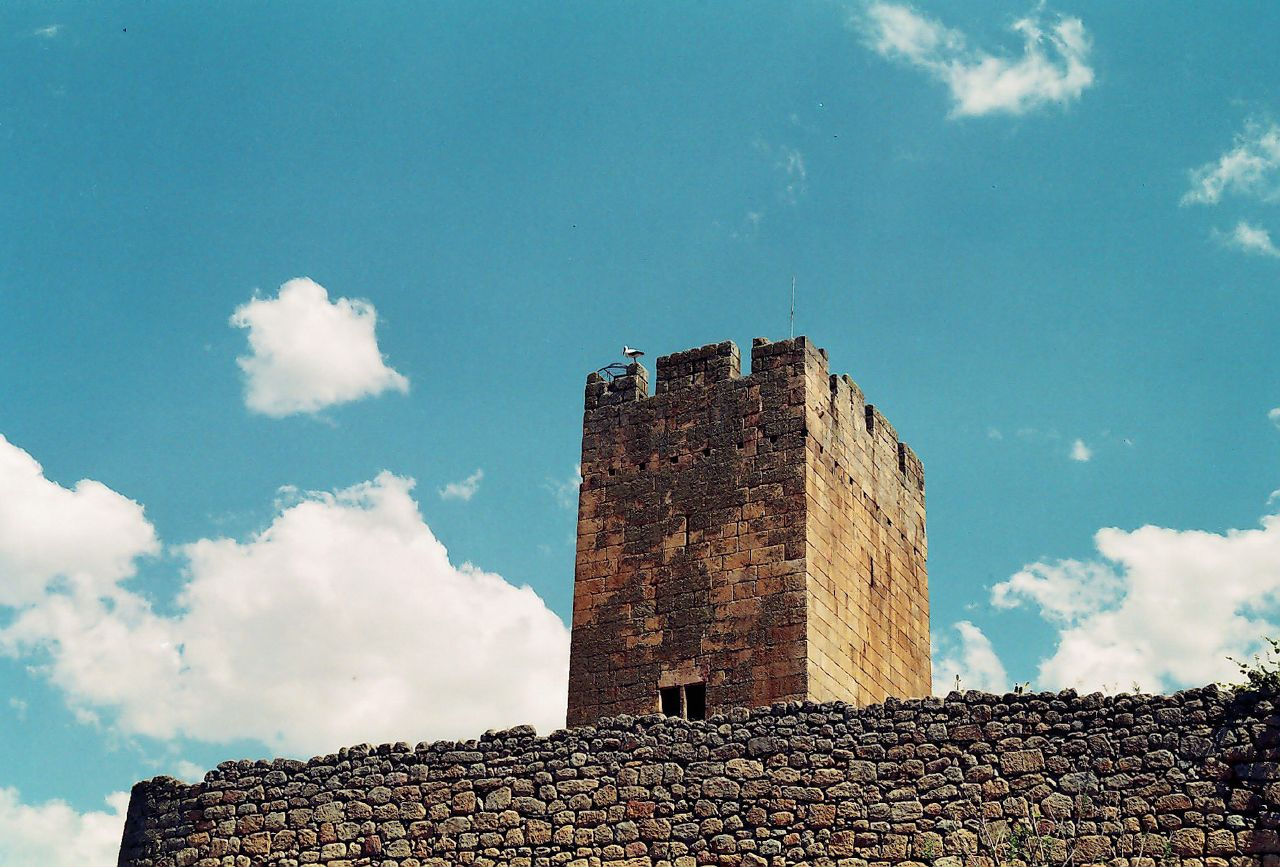 Castelo de Longroiva - Portugal